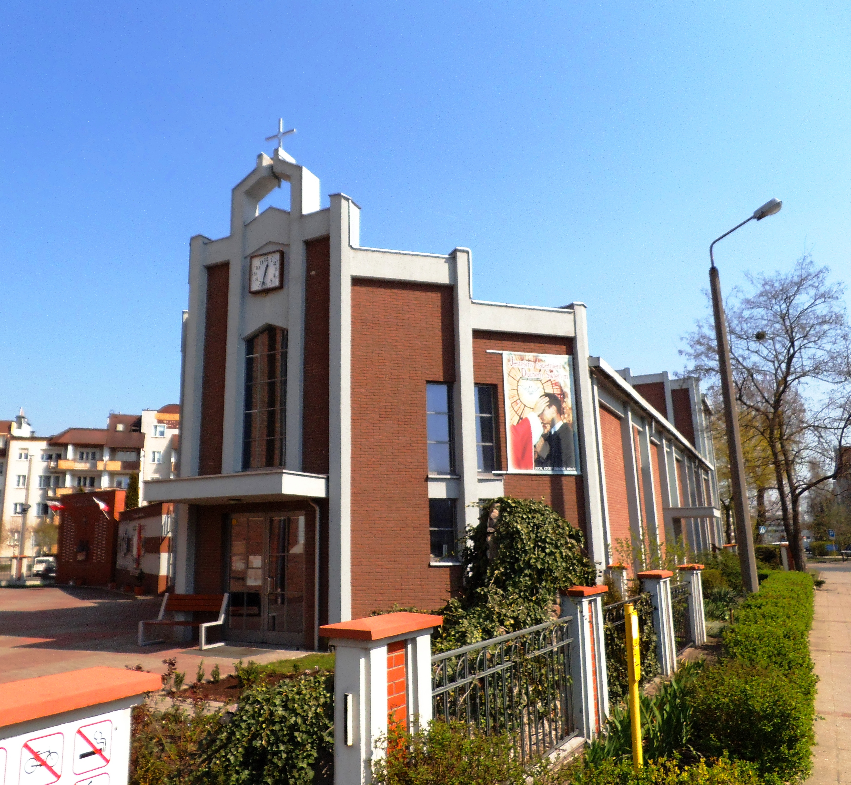 Kaplica Miłosierdzia Bożego i św. Faustyny Kowalskiej w Toruniu